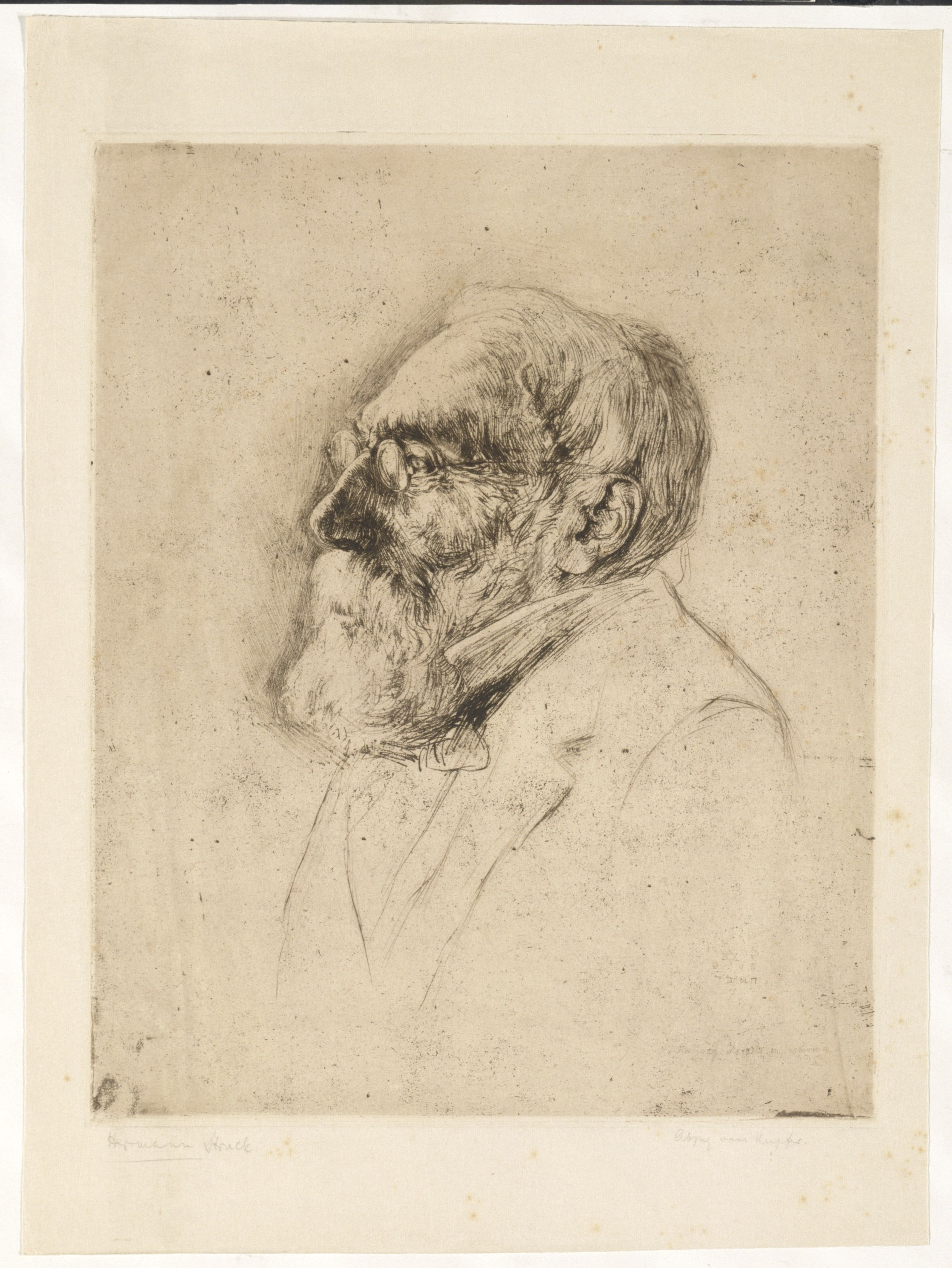 Artwork by Hermann Struck Dargestellte Person: Israels, Jozef (27.1.1824 - 12.8.1911), DNB-Link Datierung Display: 1905 Objektart: Radierung Schlagworte Inhalt /Geografie: Mann, Porträt, alter Mensch, Brille Schlagworte Kontext: Maler